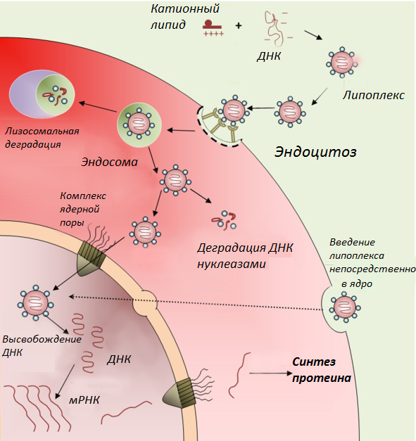 Клеточные процессы при введении ДНК в составе липоплекса